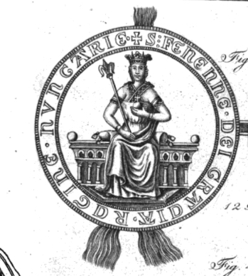 Fenenna of Kuyavia